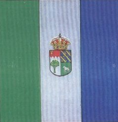 Bandera Municipal de Tinieblas de la Sierra